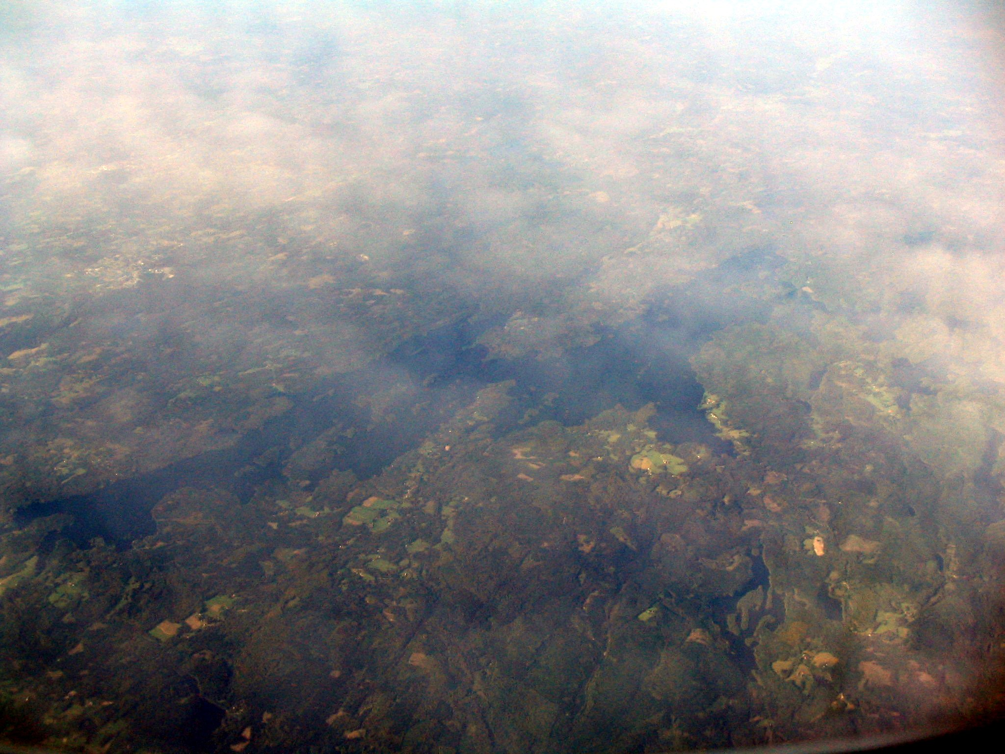 Aerial view of Lake Immeln in Skåne, Sweden